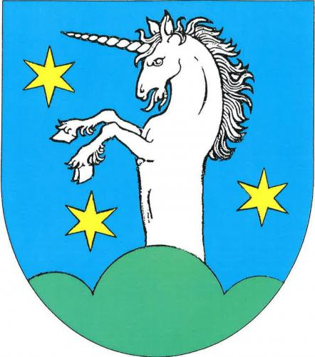 Jaroměřice znak